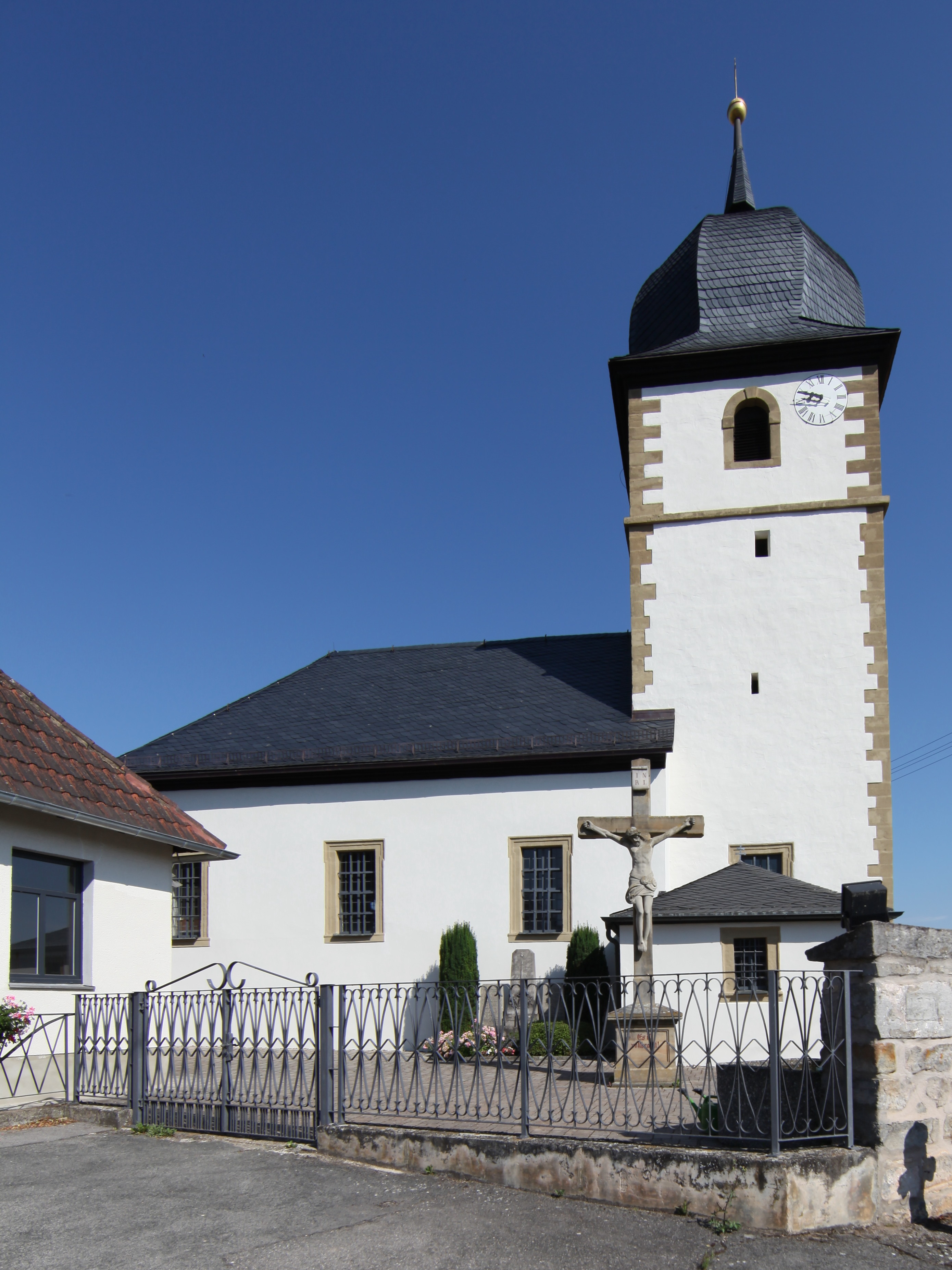 St. Antonius Eremita in Gleismuthhausen